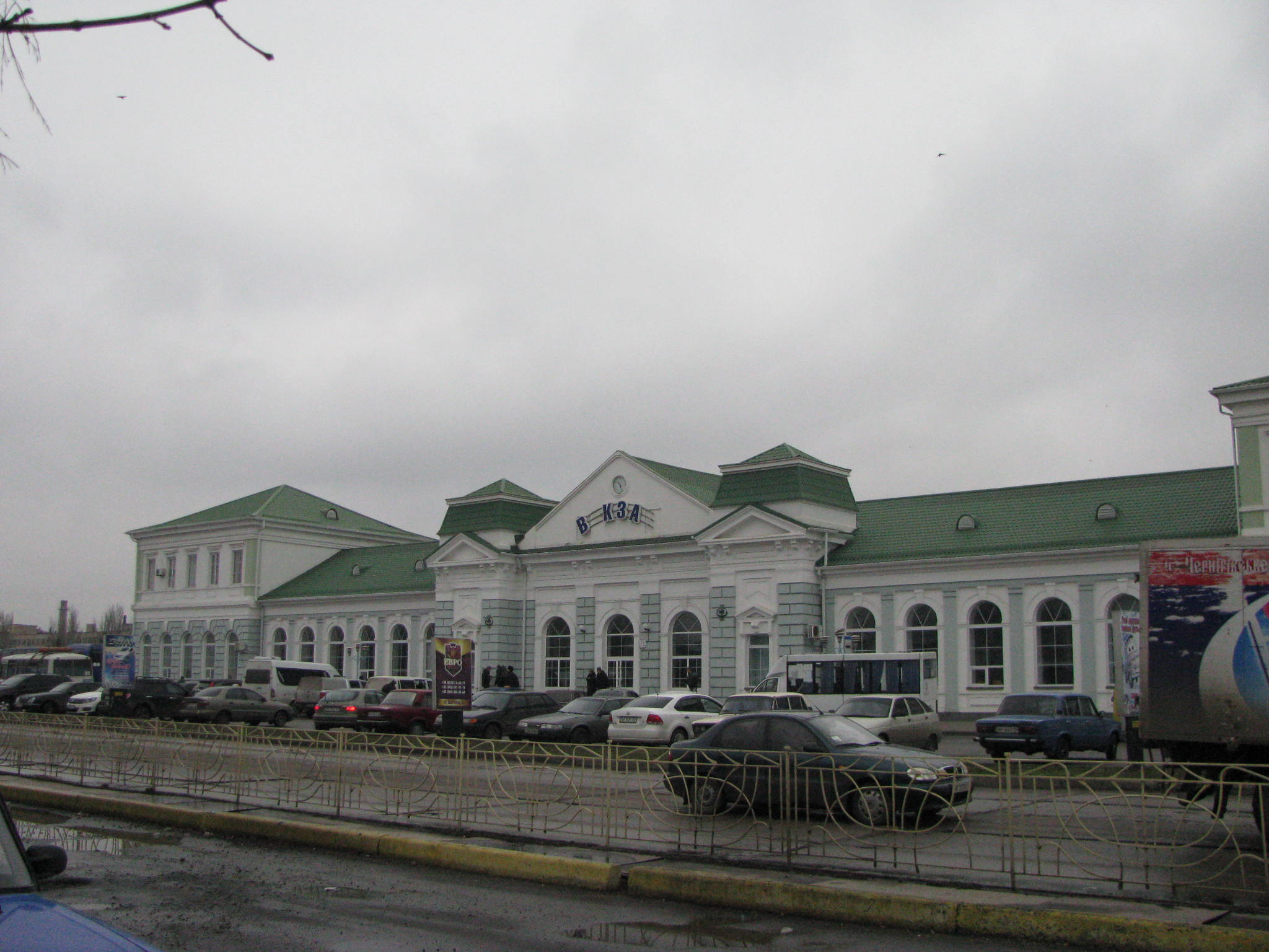 Фото